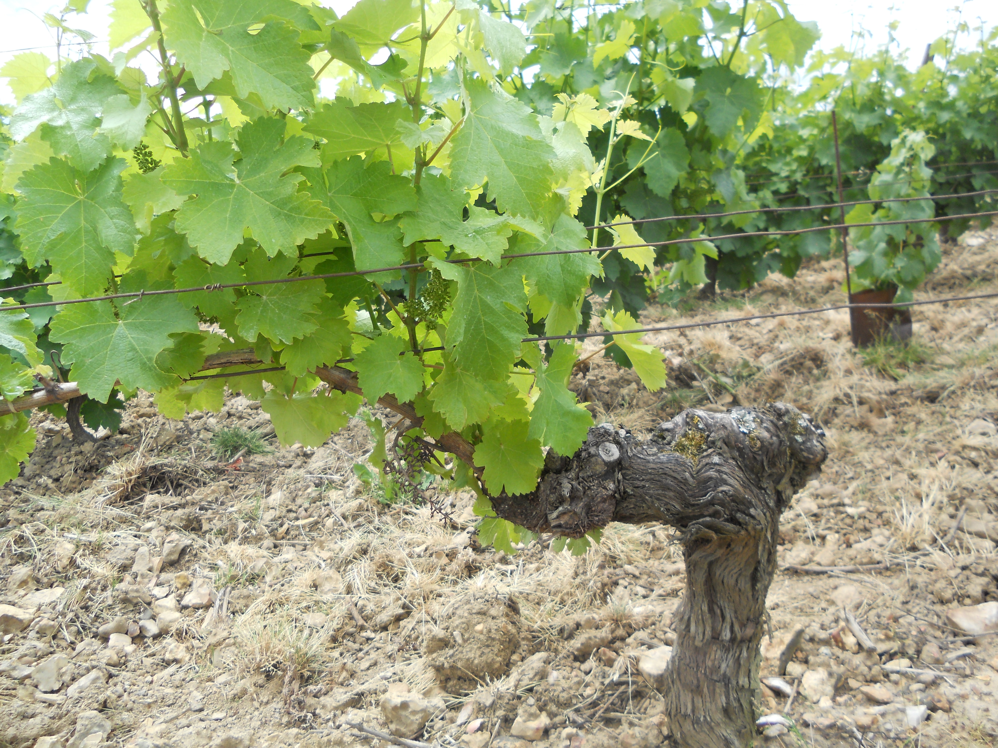 Vigne de pouilly-fumé